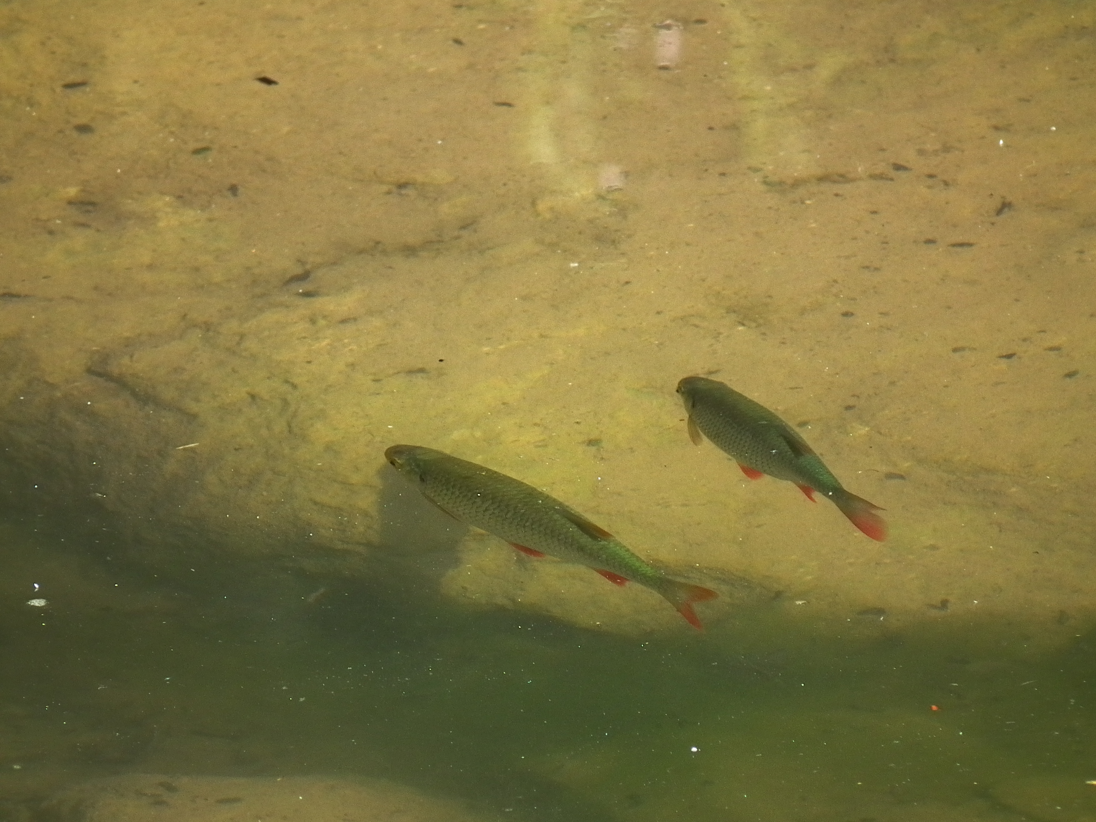 Rotfeder (Scardinius erythrophthalmus) im Wildpark Pforzheim (Baden-Württemberg, Deutschland)